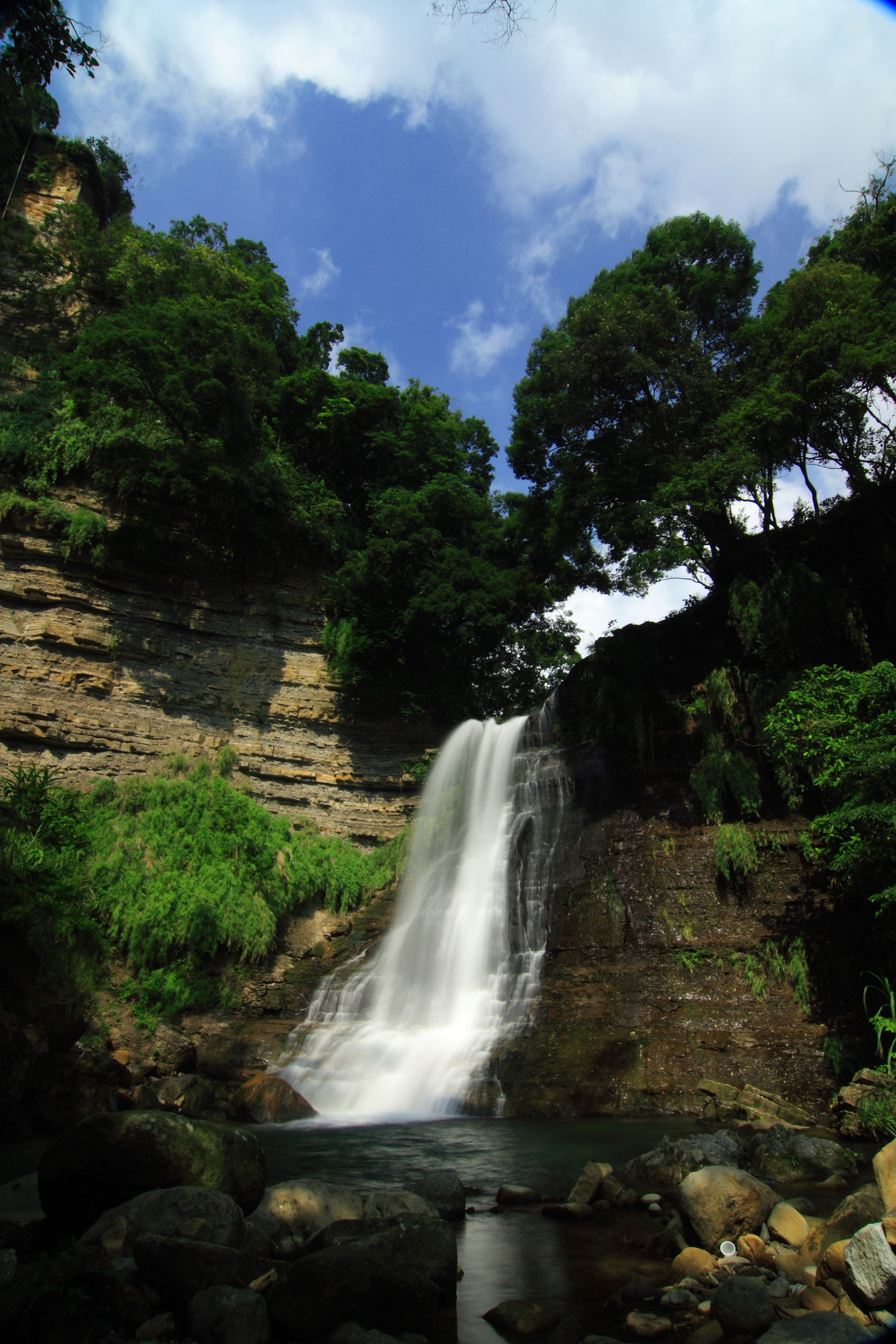 臺灣臺北市士林區的聖人瀑布。